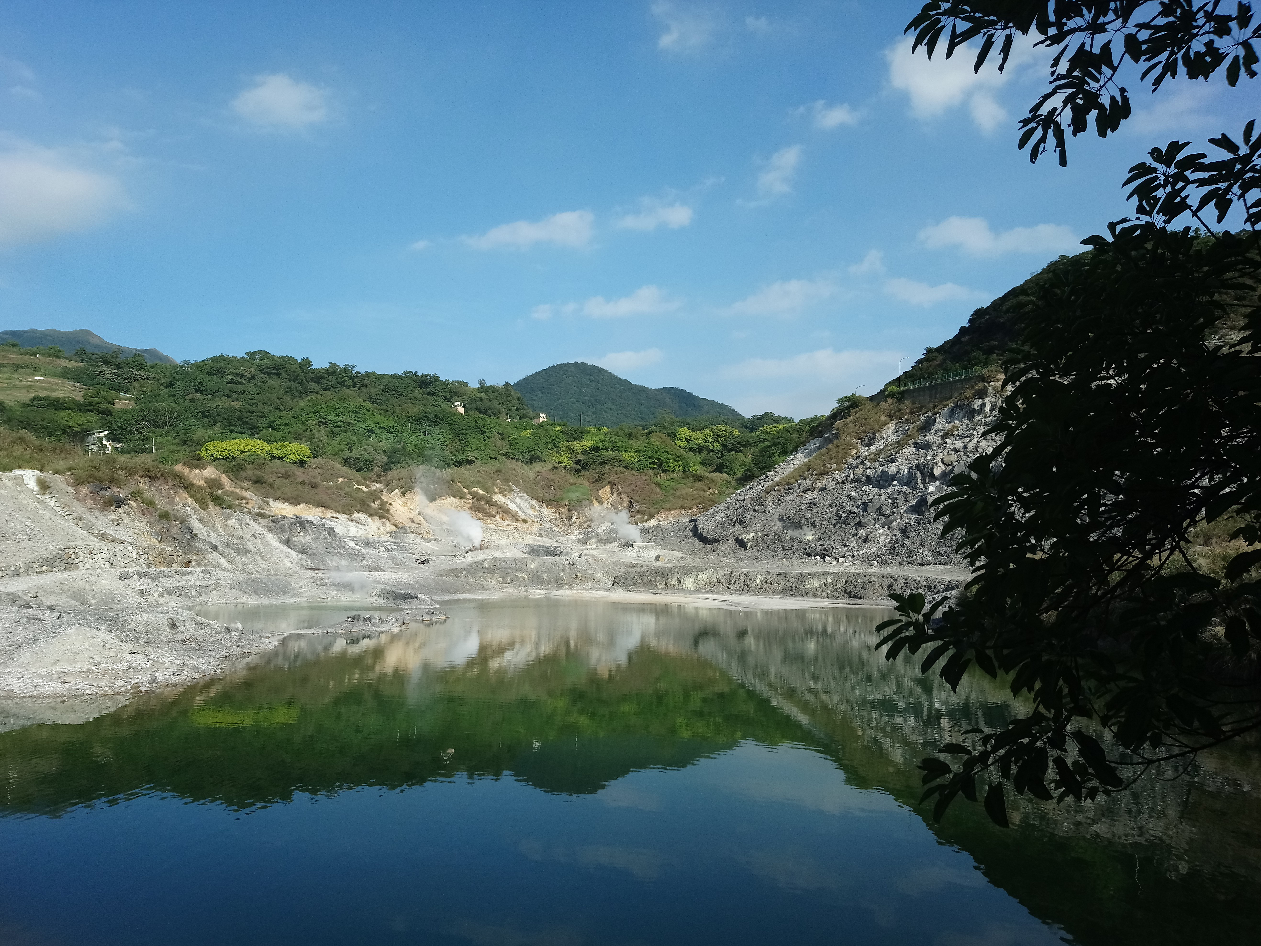 硫磺谷地熱景觀區,臺北市北投區新北投次分區林泉里